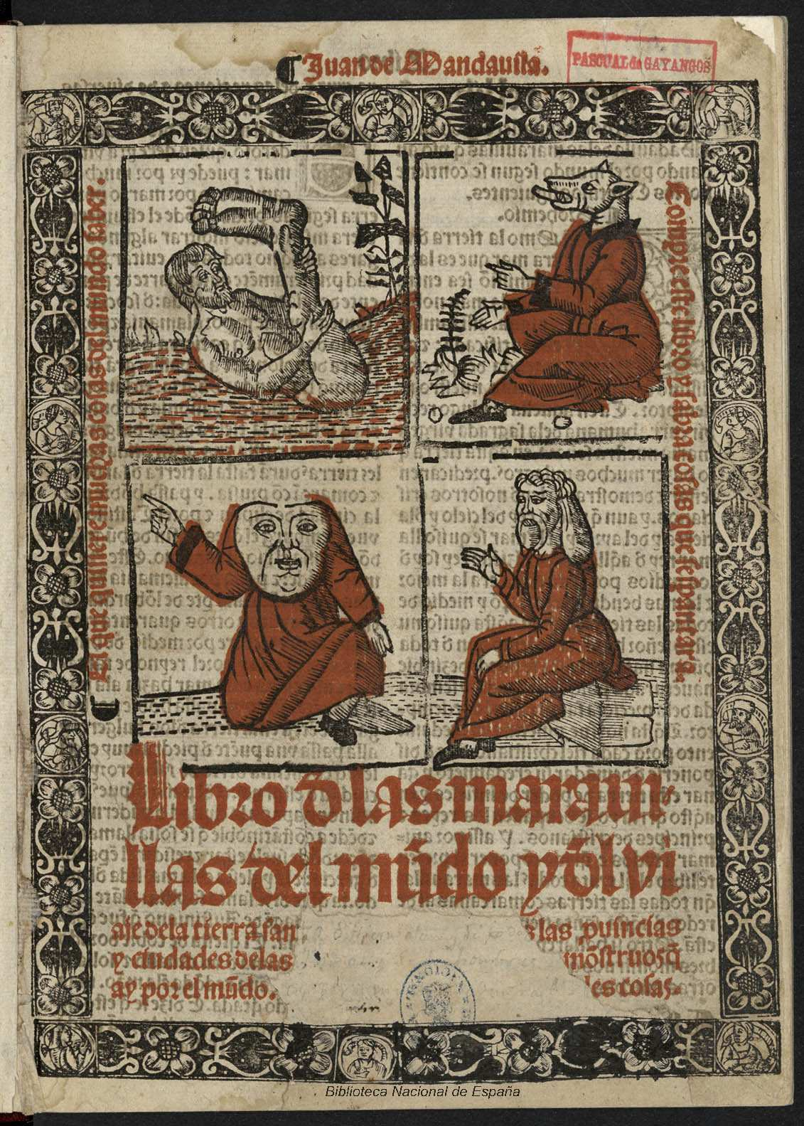 Título: Libro d[e] las marauillas del mū[n]do y d[e]l viaje de la tierra sancta de jerl´m y de todas las p[ro]uincias y ciudades de las Indias y d[e] todos los ōbres mōstruos q ay por el mūdo ... Iuan de Mandauila Autor: Mandeville, Jean (ca. 1300-1372) Fecha: 1524 Datos de edición: Fue impremida ... Valencia [s.n.]